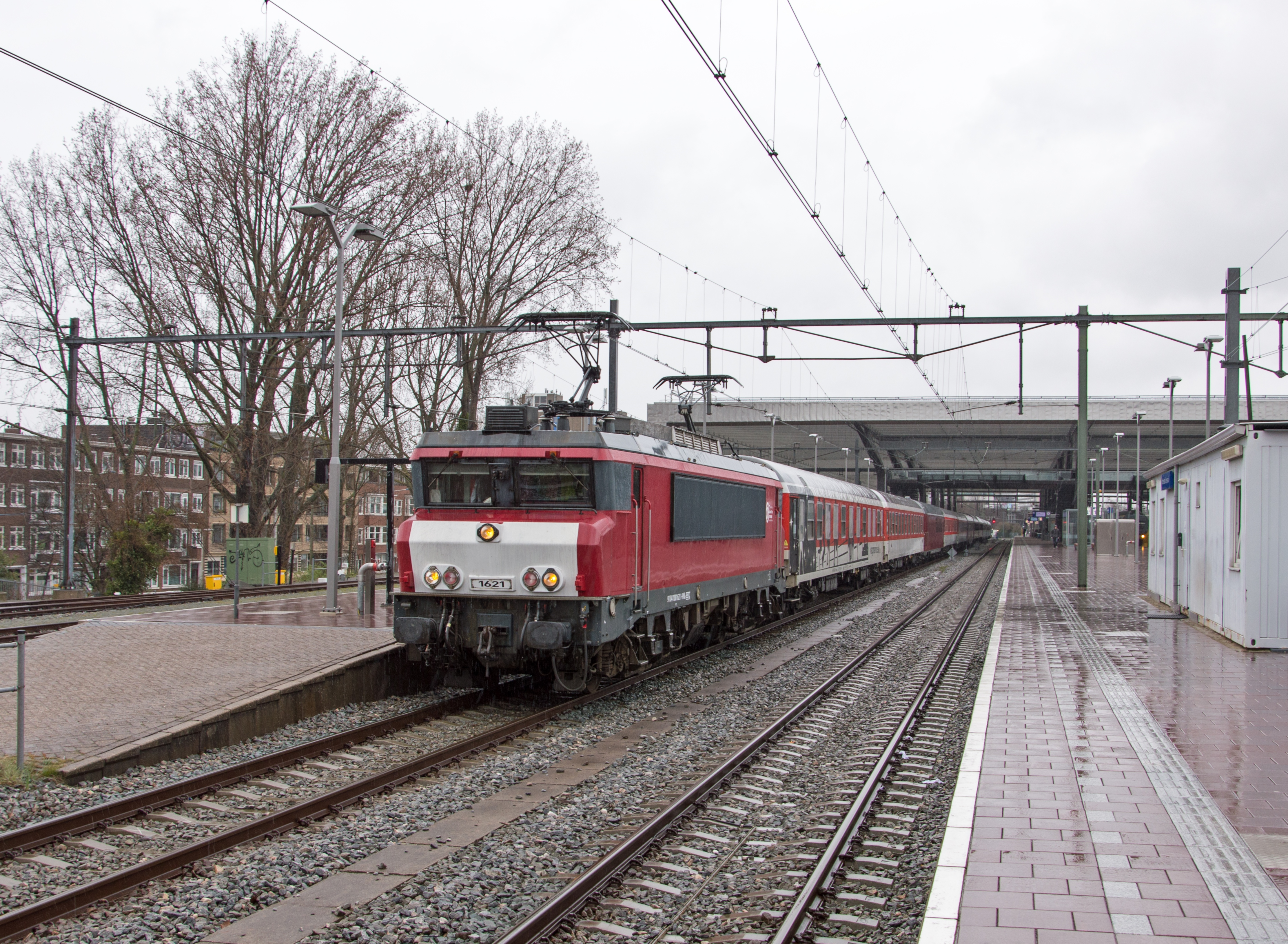 In 2015 reed de laatste skitrein van het seizoen via de omleidingsroute Rotterdam - Gouda naar Amsterdam. Op het moment dat ik de foto maakte in de stromende regen, wist ik nog niet dat dit 'echt' de laatste inzet was van EETC 1621. Hier staat de loc met trein 13416 op Rotterdam Centraal.